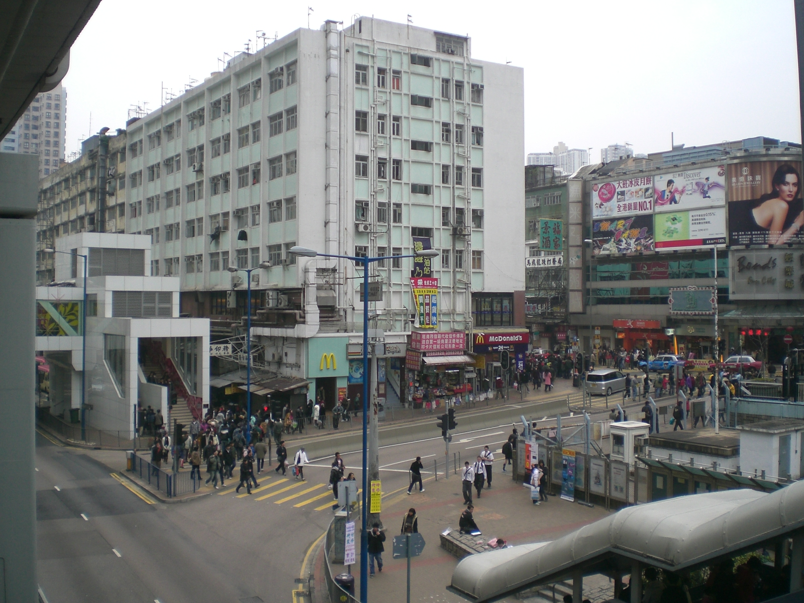 觀塘觀塘道望同仁街裕民坊裕民坊大廈, Kwun Tong Road